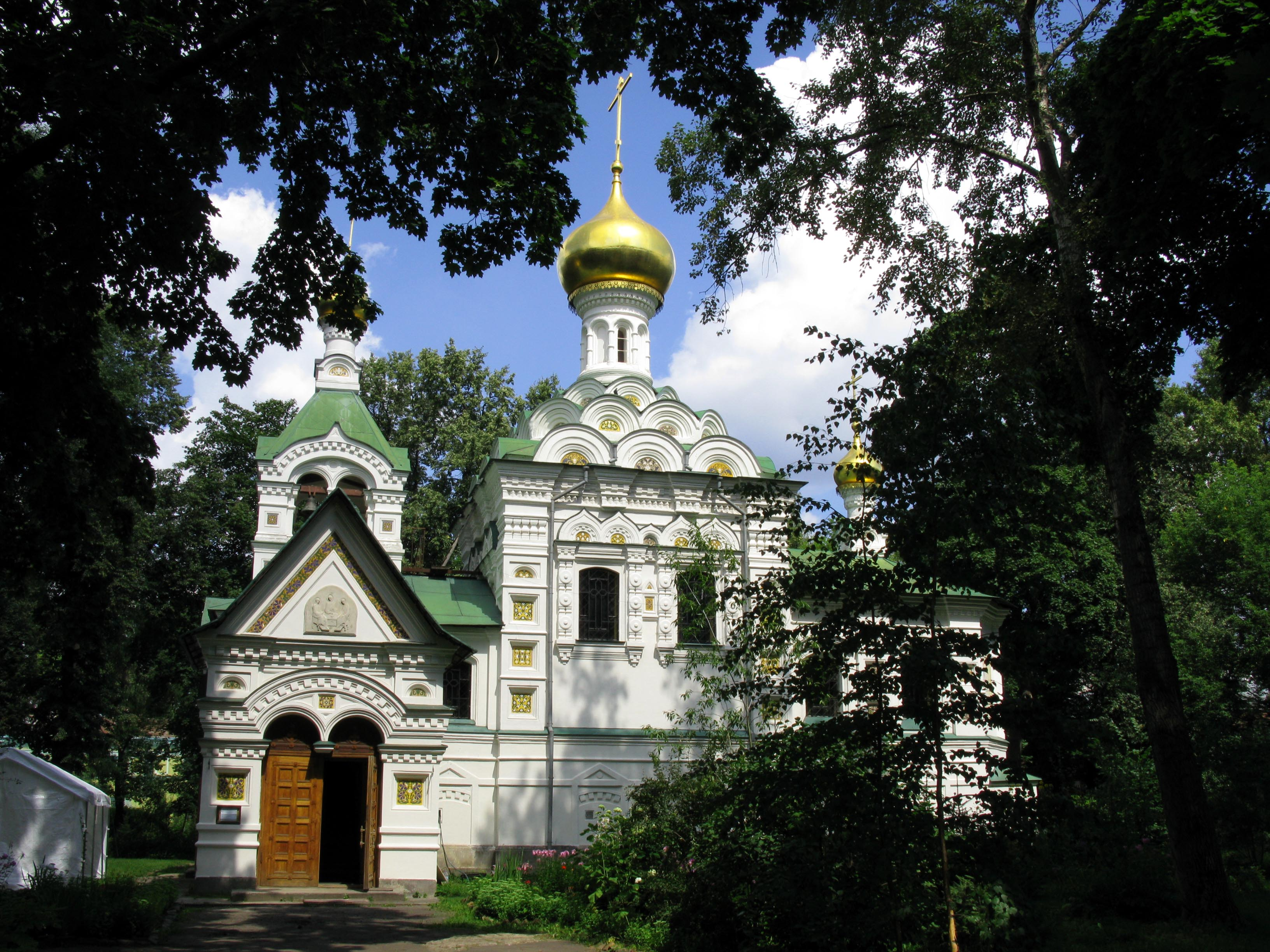 Церковь Троицы Живоначальной при детской больнице святого Владимира